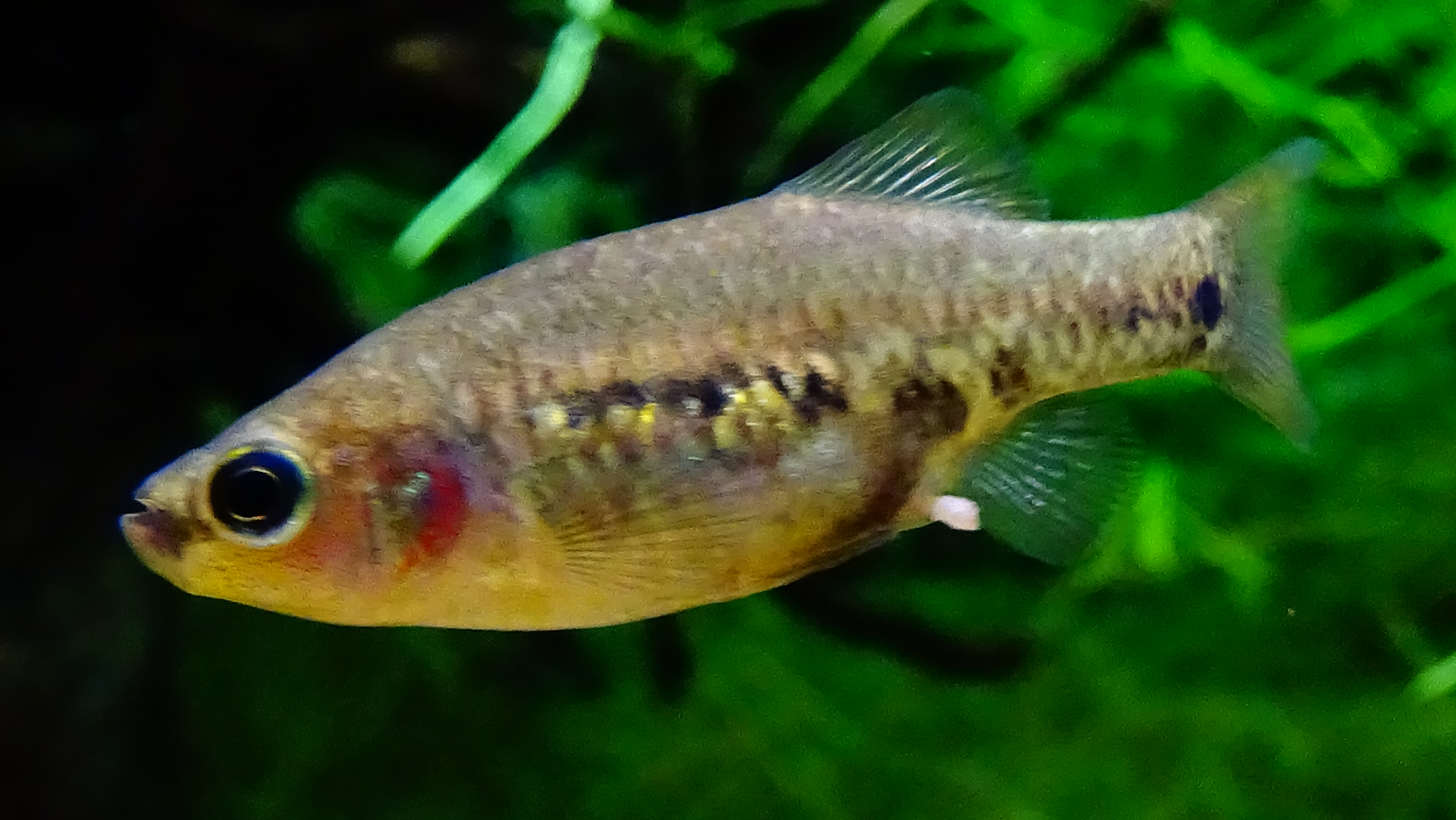 Zoogoneticus tequila - Aquarium Tropical du Palais de la Porte Dorée - Paris/France - 29/04/2015